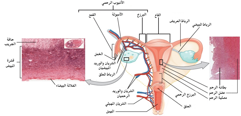 رسم تخطيطي يوضح الجهاز التناسلي الأنثوي في وجود جدار الرحم الكبير وبطانة الرحم الطبيعية